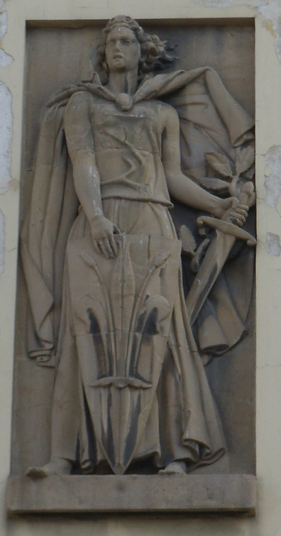 Caserma della Scuola allievi ufficiali dei Carabinieri, bassorilievo con figura femminile e stemma firenze